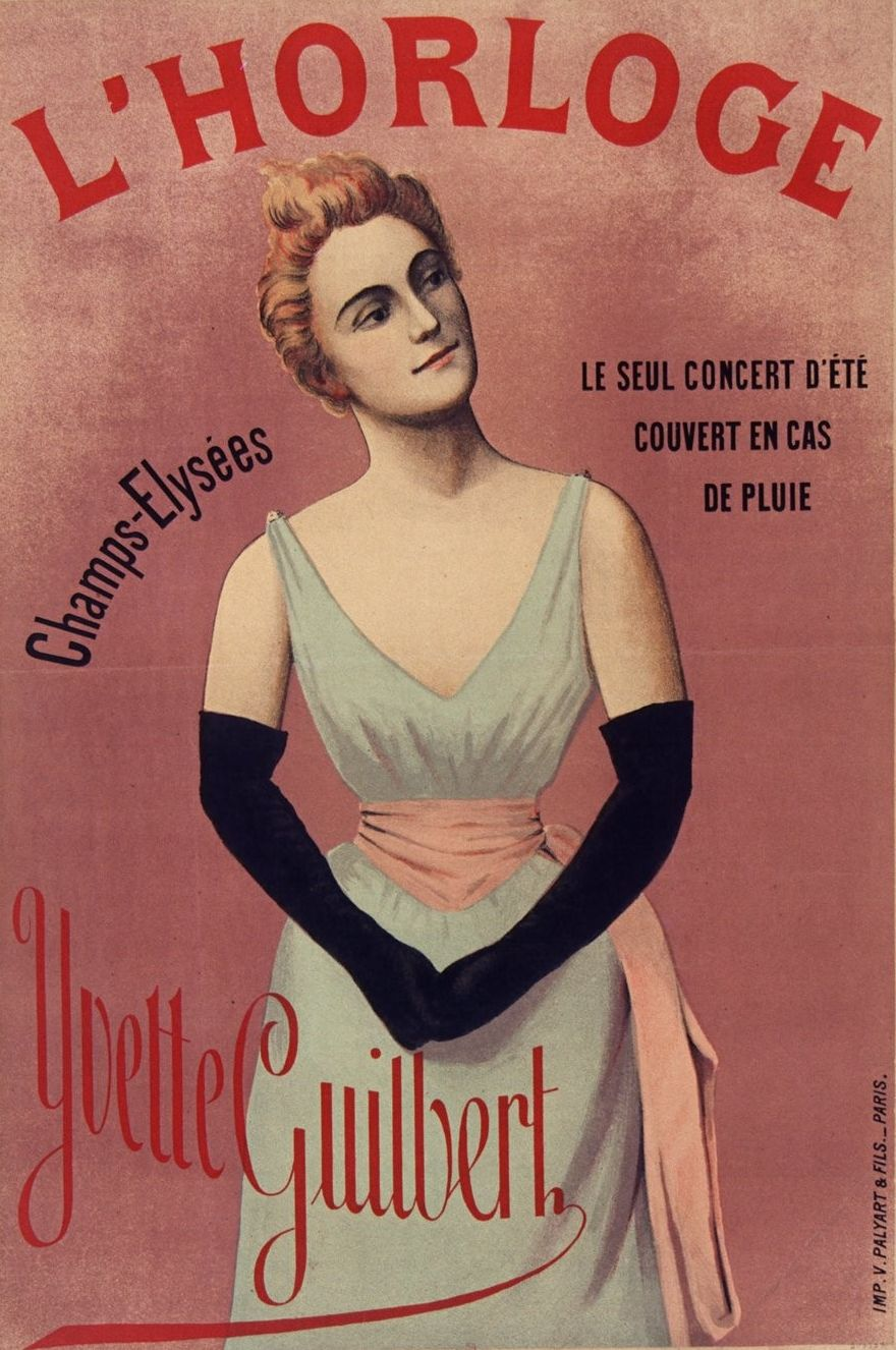 L'Horloge. Champs Elysées. Le seul Concert d'été couvert en cas de pluie. Yvette Guilbert